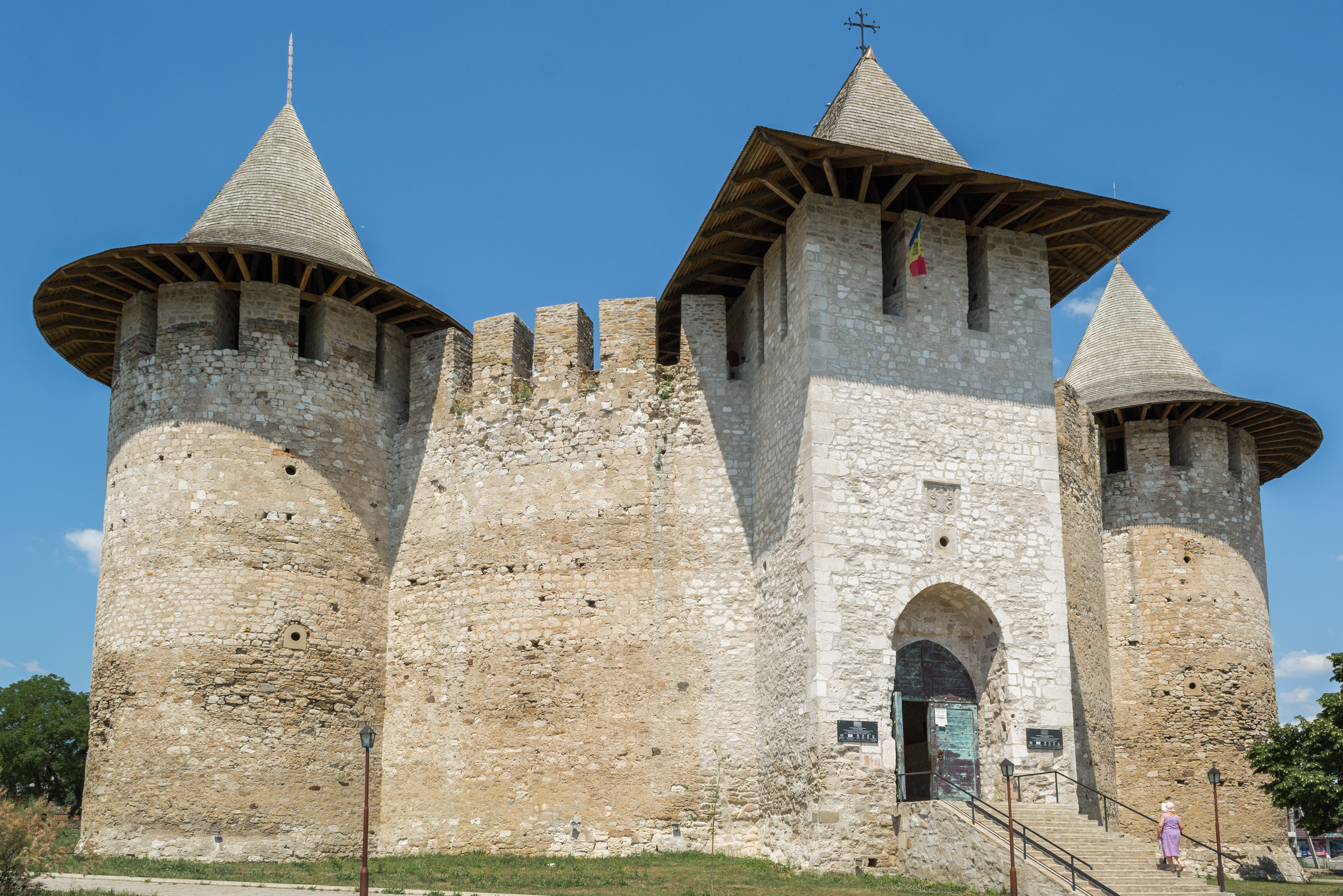 Сорокская крепость / Cetatea Soroca / Soroca Fortress